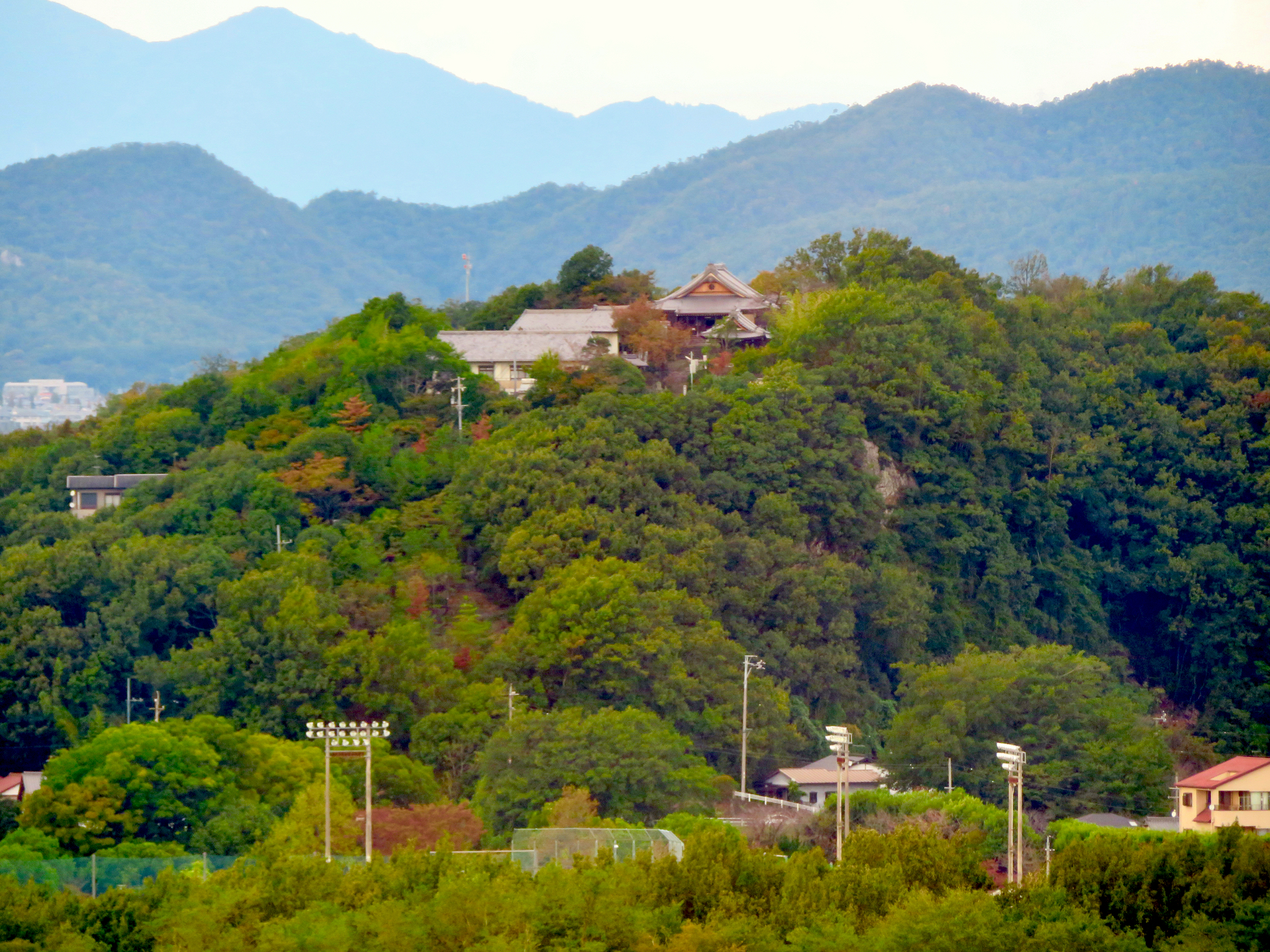 木曽川対岸の愛知県江南市にある「すいとぴあ江南」から撮影した仏眼院。